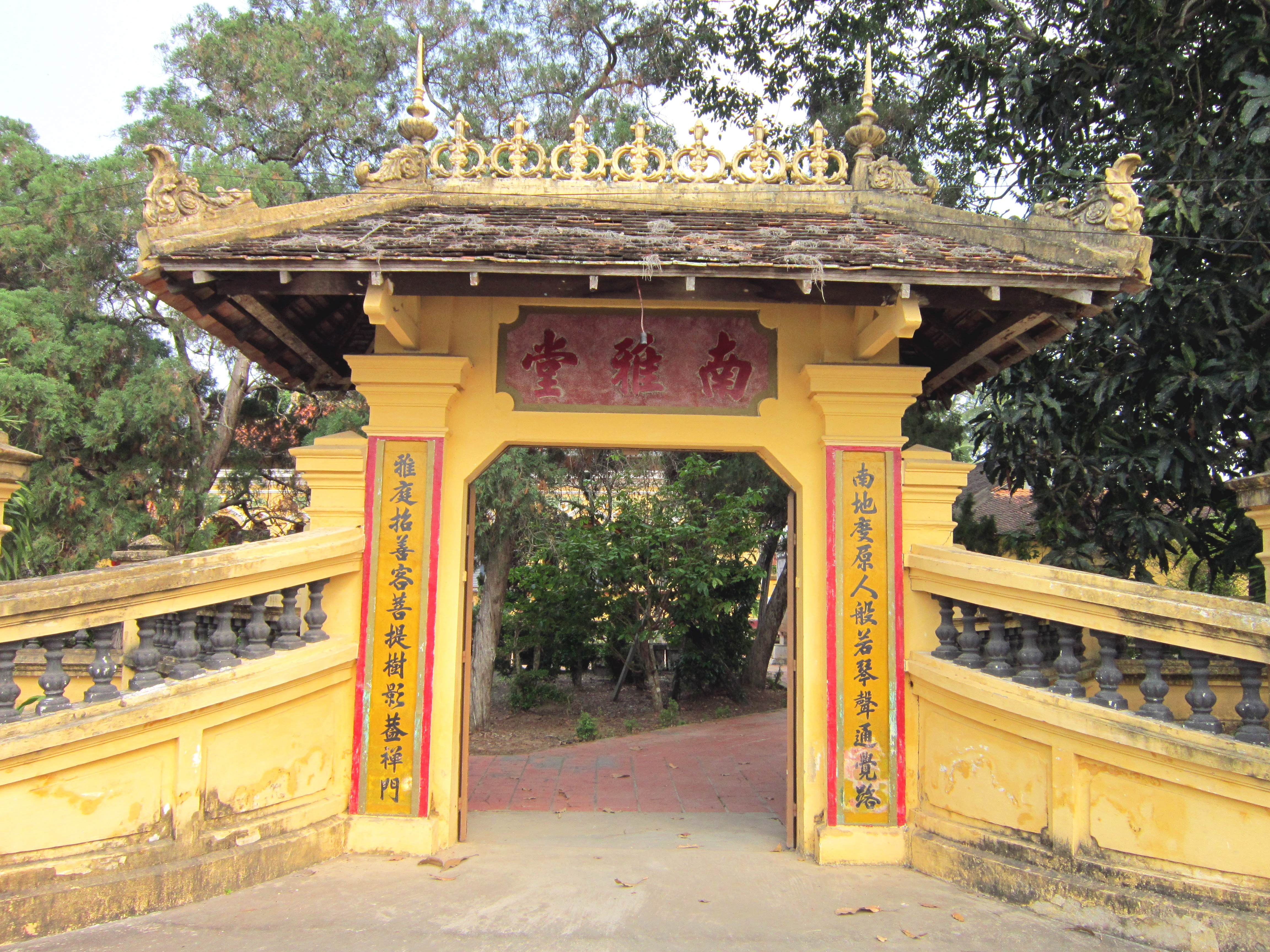 Cổng chùa Nam Nhã tọa lạc ở số 612, đường Cách Mạng Tháng Tám, phường An Thới, quận Bình Thủy, thành phố Cần Thơ, Việt Nam.